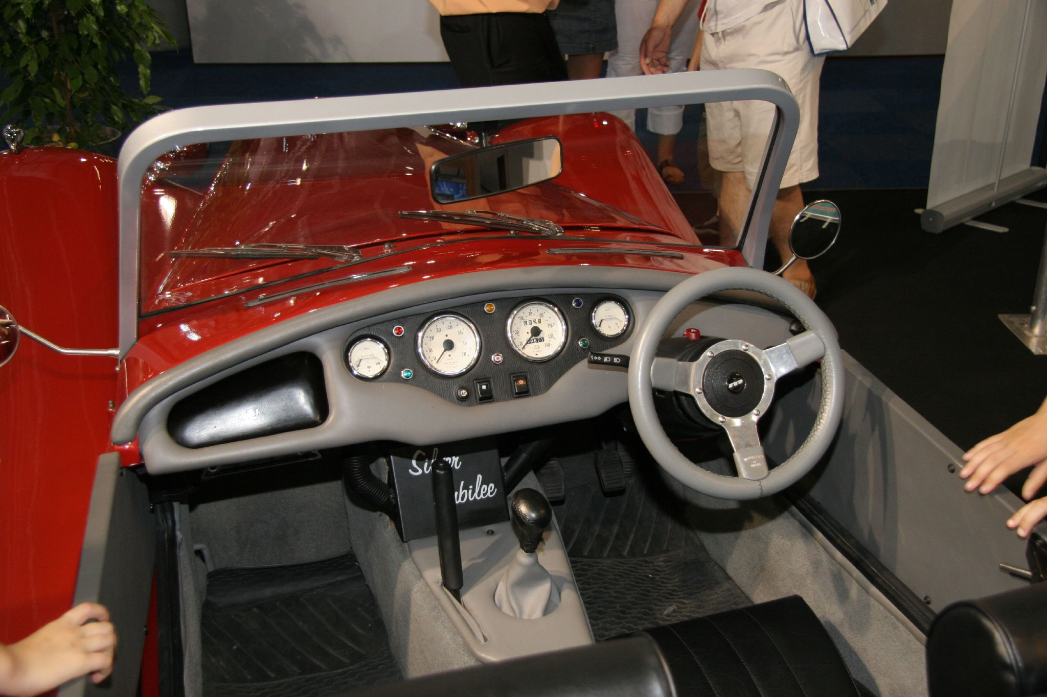 Aquila JuliettaAquila Julietta